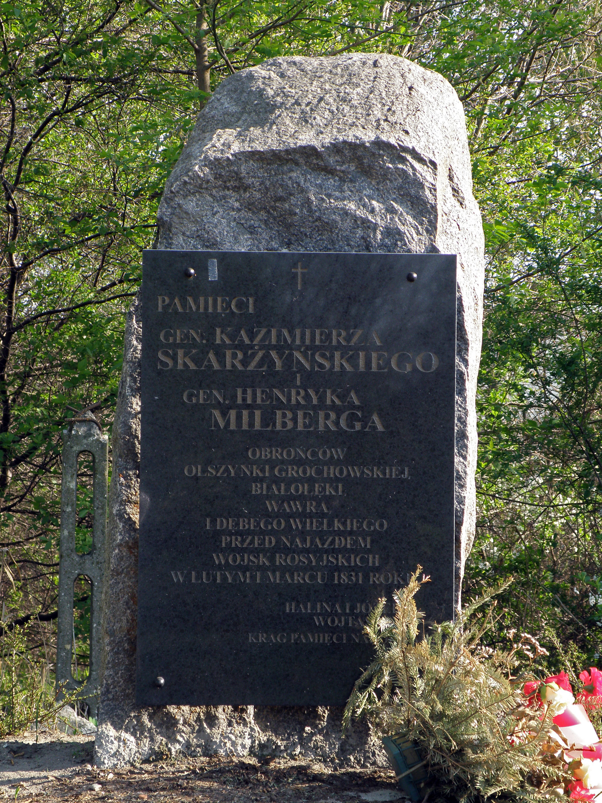 Olszynka Grochowska - Aleja Chwały, ul. Traczy